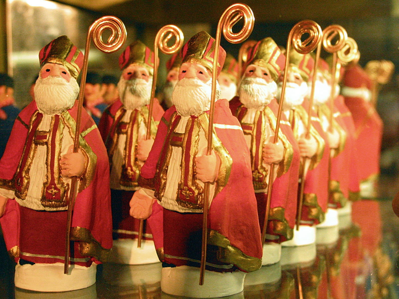 Saint Nicolas. - Santon wallon de Robert Noirhomme. Walon: Sint Nicolê - Santon walon di Robert Noirhomme.